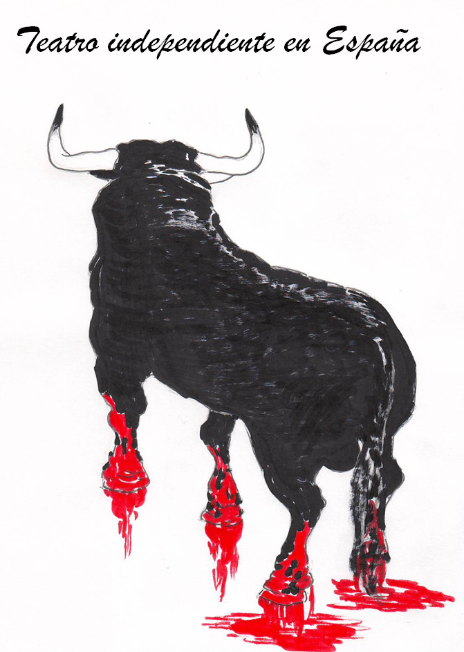 Composición de cartel para ilustrar la página Teatro independiente en España.